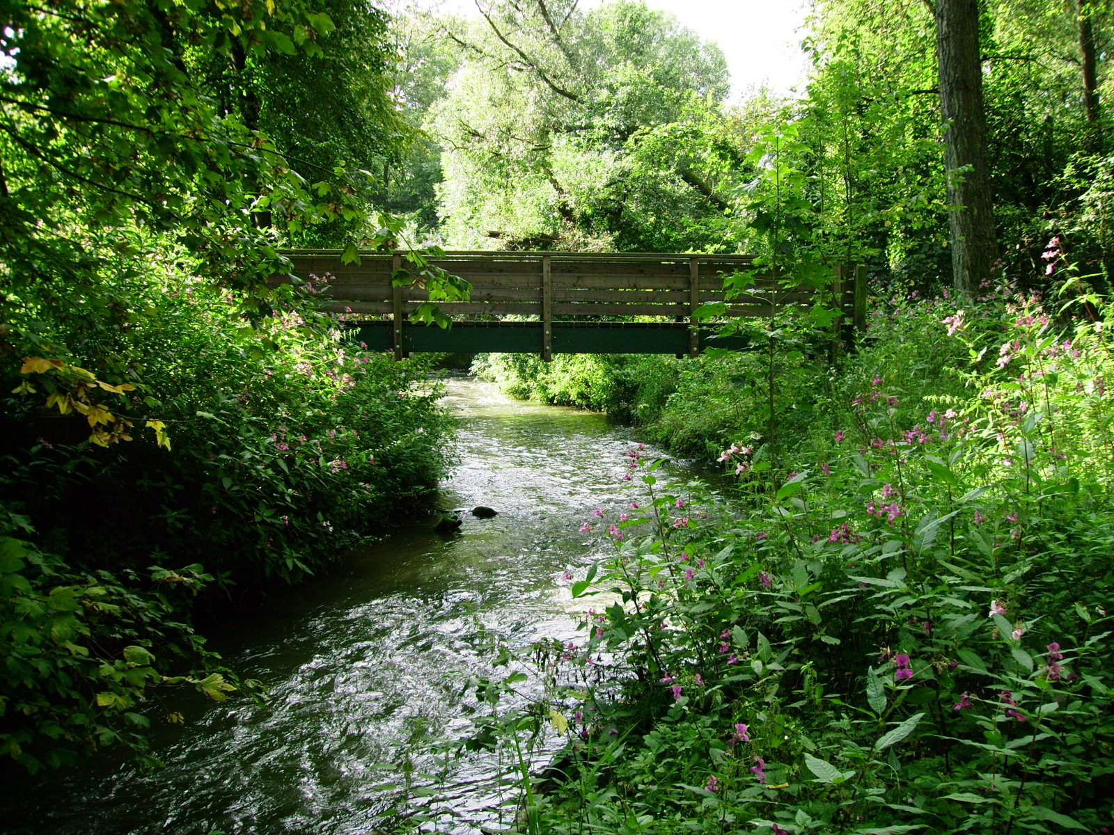 Im Naturschutzgebiet Biberhacken bei Nersingen. Abgebildet: Die Biber, ein Nebenfluss der Donau.